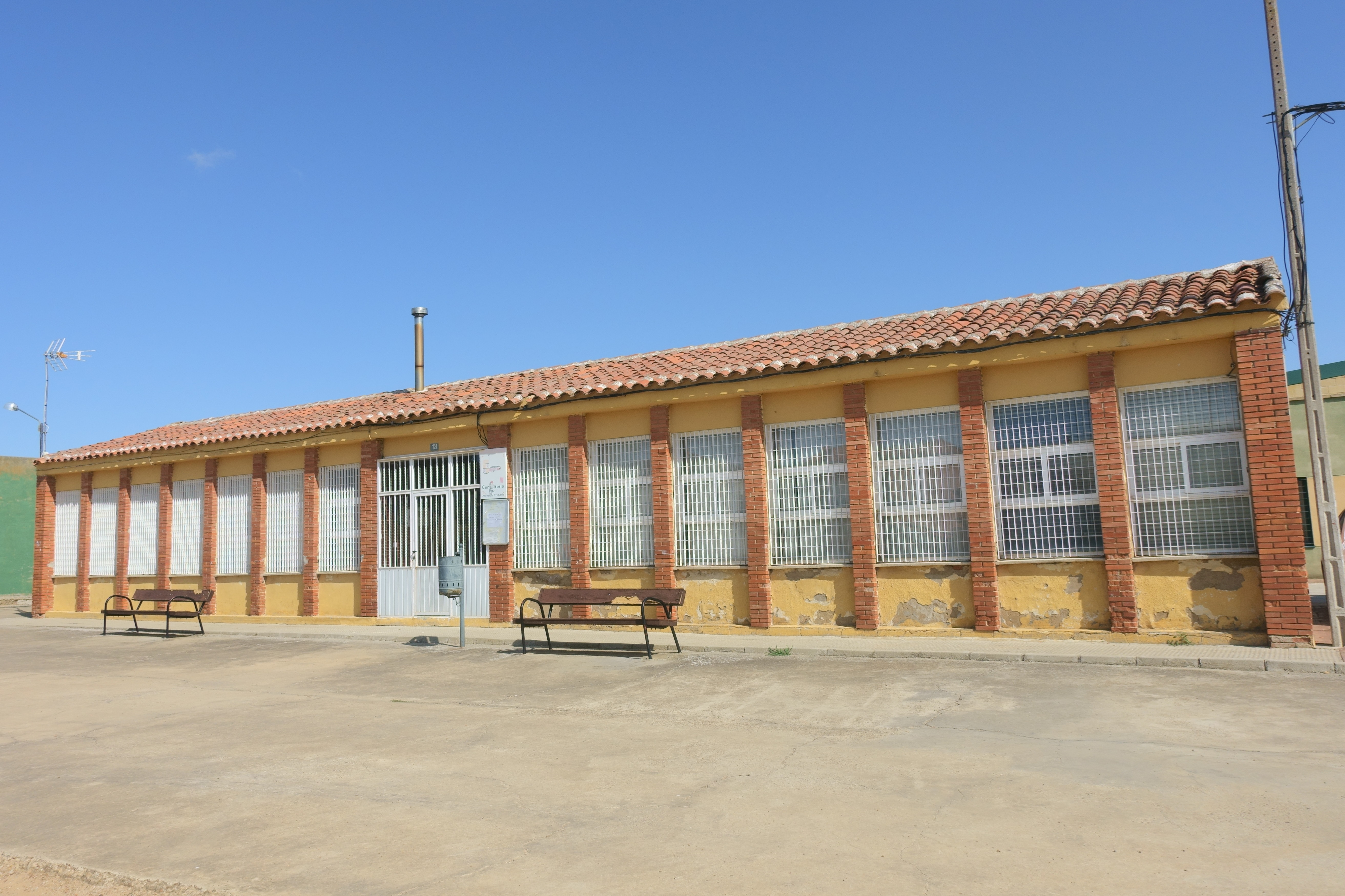 CEIP Nuestra Señora del Socorro, en La Unión de Campos (Valladolid, España).